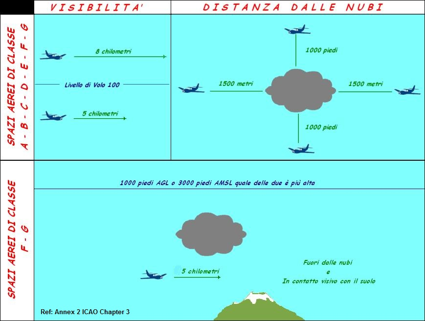 Visual Meteo Conditions. Realizzata dall'utente Pikappa.